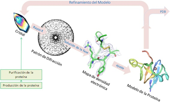 Modelo de construcción (refinamiento)